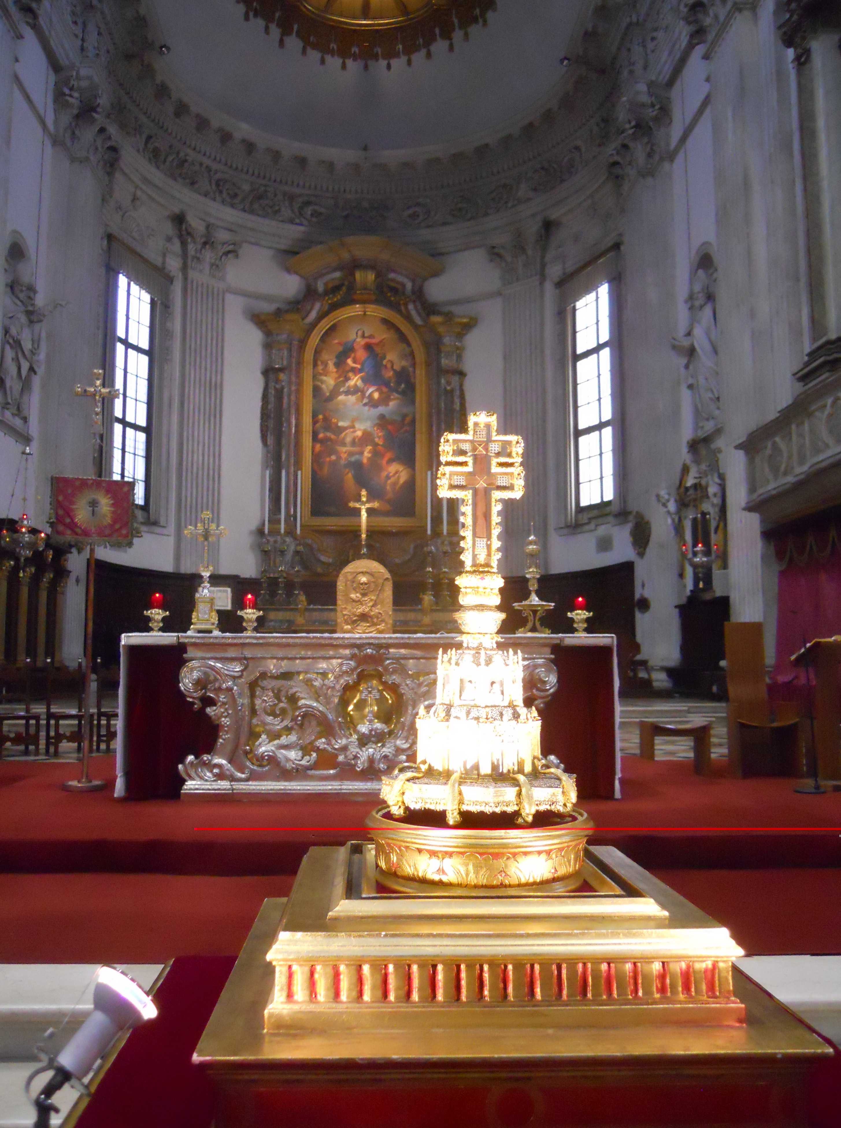 Reliquiario della Santa Croce (esposizione settembre 2011)